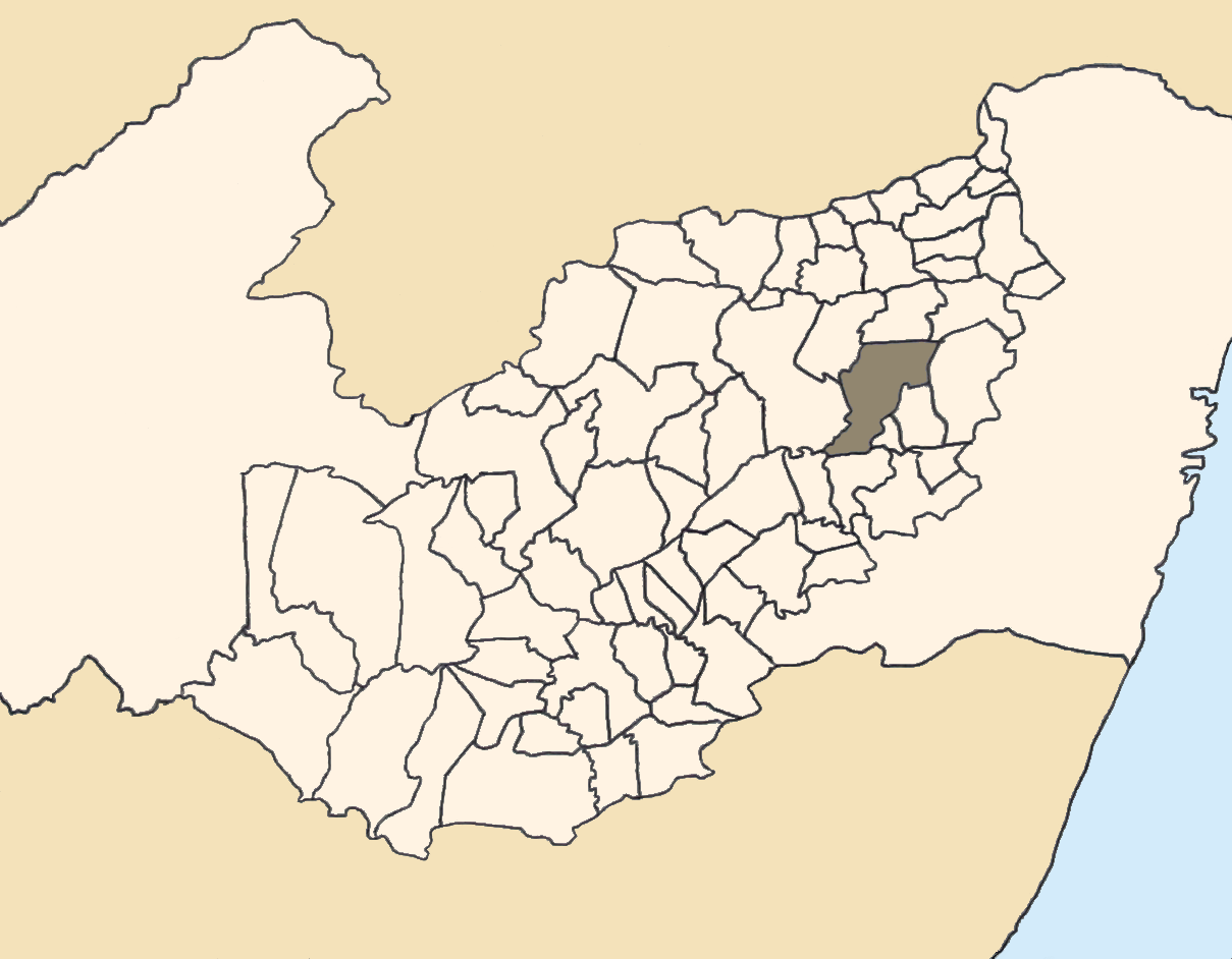 Mapa da mesorregião Agreste de Pernambuco (Brasil) subdivida em municípios. Em destaque, o município de Bezerros. Map of the brazilian state of Pernambuco (mesorregião Agreste) showing the city of Bezerros. Imagem tratada com o GIMP. Image made with GIMP.